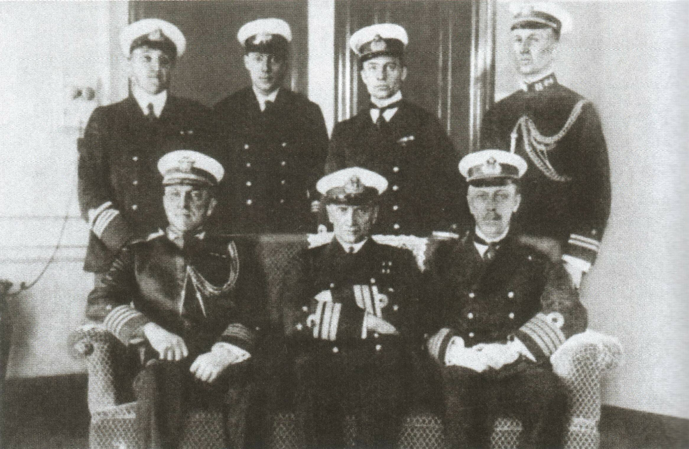 Члены русской морской миссии в США во главе с А. В. Колчаком (сидит в центре) с американскими морскими офицерами в Нью-Йорке. Справа от Колчака — М.И. Смирнов, вторым слева стоит лейтенант Вадим Степанович Макаров, сын адмирала С. О. Макарова